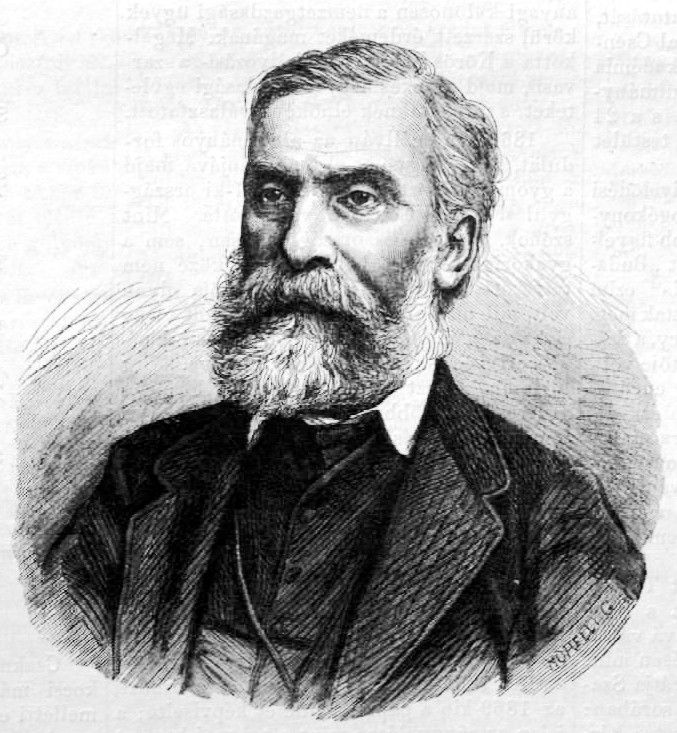 Trefort Ágoston portréja. Morelli Gusztáv metszete